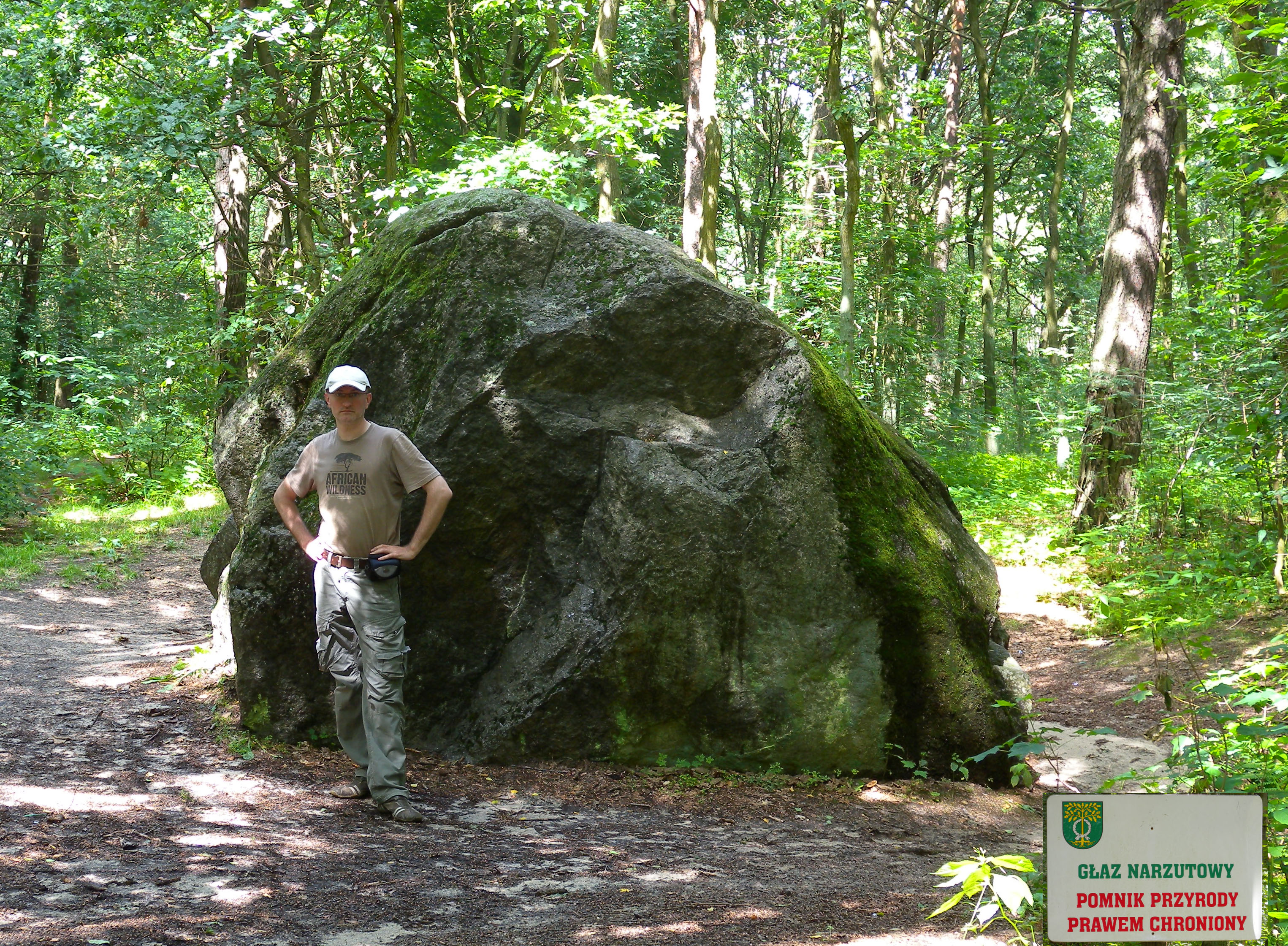 Pomnik Przyrody GŁAZ NARZUTOWY "KAMIENNY DOM" W SZCZEPANKOWIE. Jest to największy głaz narzutowy na Pałukach, jego wymiary to: wysokość - 3,15 m, obwód - 13 m. Z powodu rozmiarów nazywany bywa "Olbrzymem". Legenda tłumaczy inną nazwę - "Kamienny Dom": W zamierzchłych czasach stał tu zameczek, w którym mieszkał zły czarownik. Dzieci, które zbłądziły w lesie, zapraszał do siebie i zaklinał w kamienne figury. Zaklęcie zdjął brat dwojga zaczarowanych dzieci, który rozpoznał je w kamieniu. W ten sposób czarownik i jego zamek zamienili się w ogromny głaz, który nazwano Kamiennym Domem.